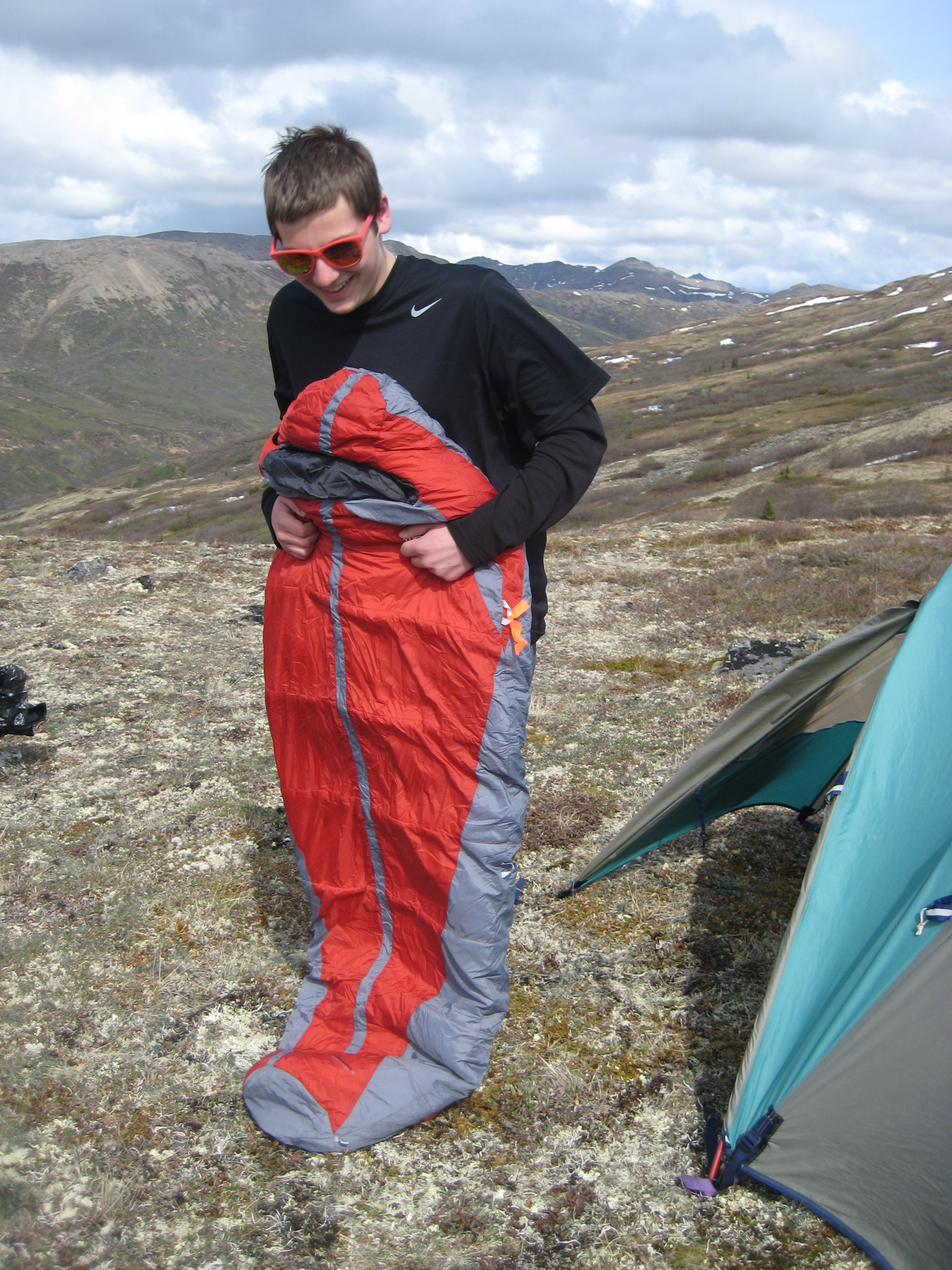 Tigger-sized sleeping bag